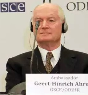 Avrupa Güvenlik ve İşbirliği Teşkilatı adına 2015 Türkiye genel seçimlerini değerlendiren Ignacio Sánchez Amor, Vilija Aleknaitė-Abramikienė ve Geert-Hinrich Ahrens.